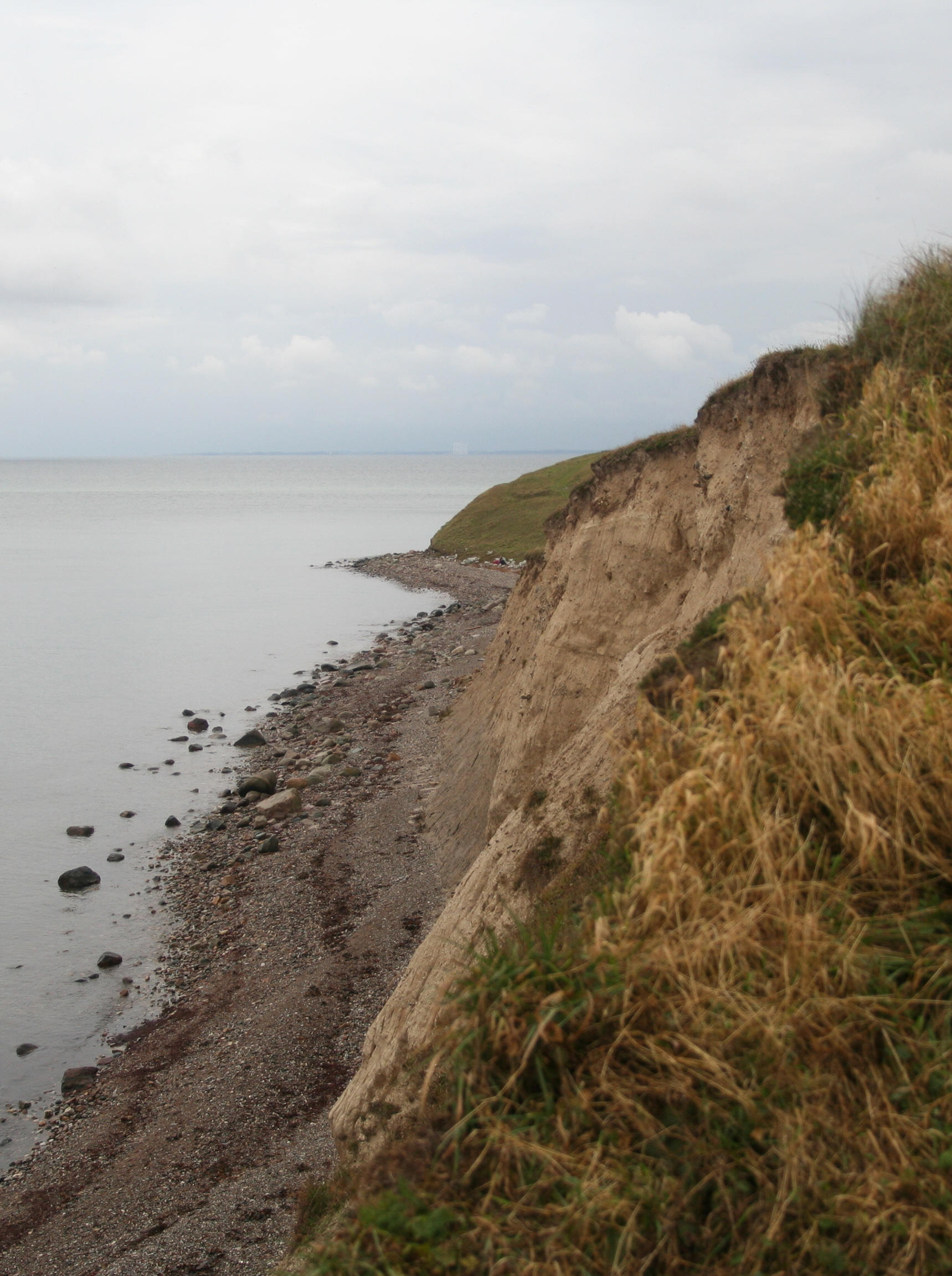 Fyns Hoved